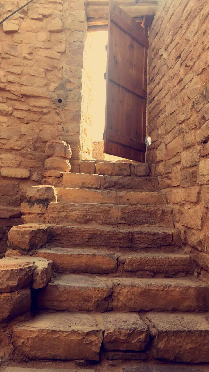 مسجد عمر خلال الدخول